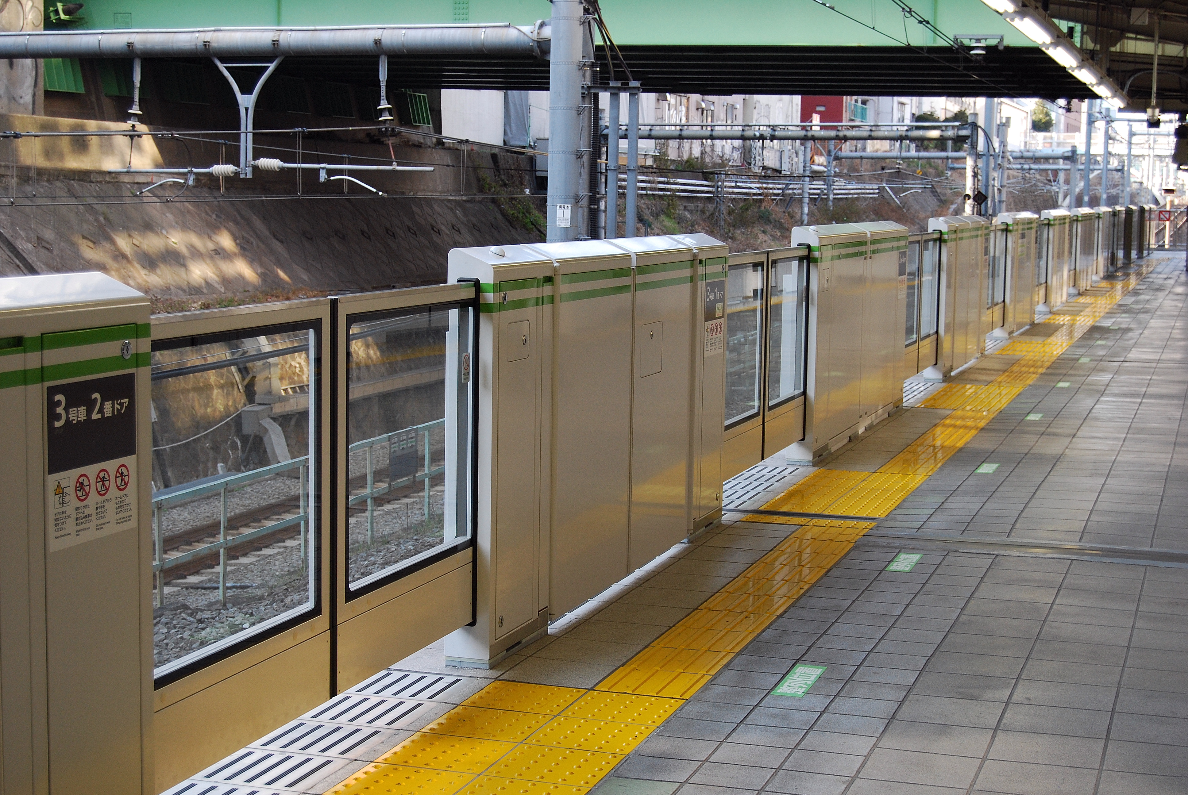 山手線目黒駅外回りホームに設置されたホームドア。